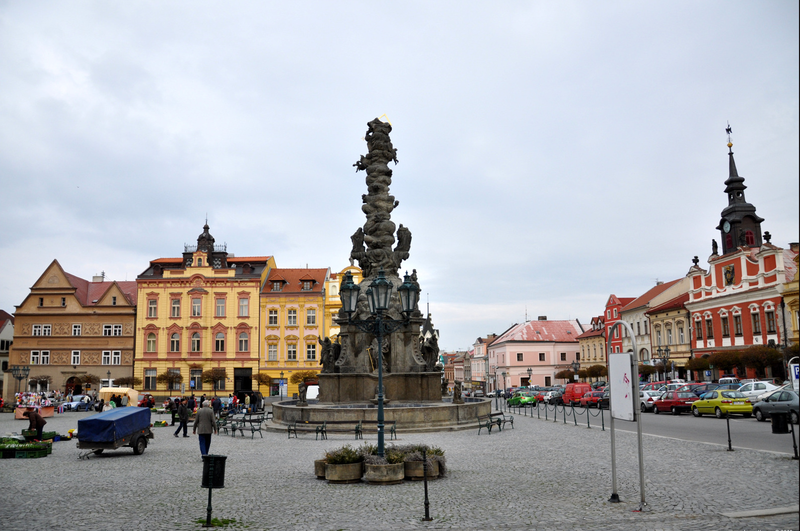 Chrudim